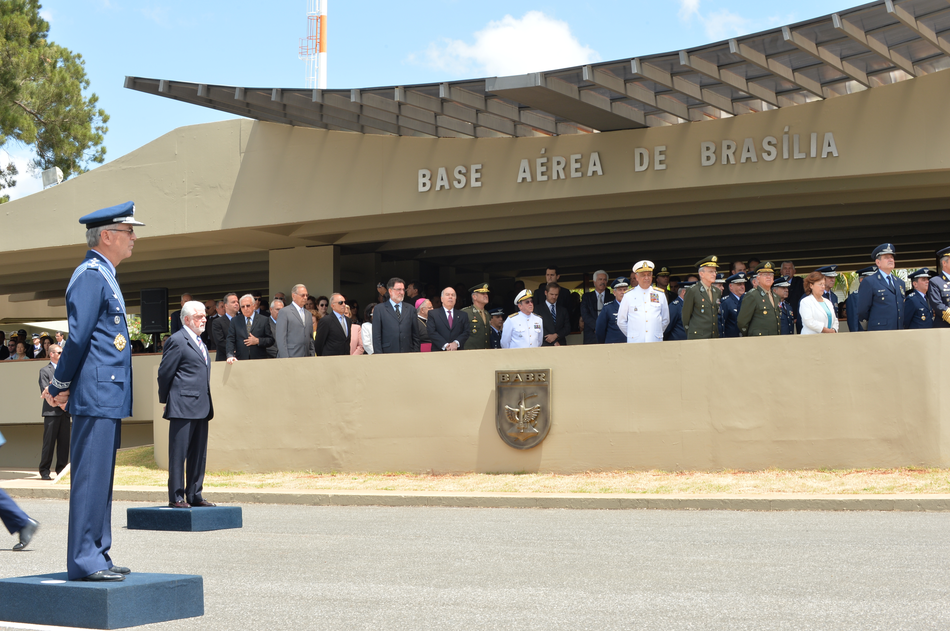 30/01/2015, Brasília - DF Fotos: Tereza Sobreira